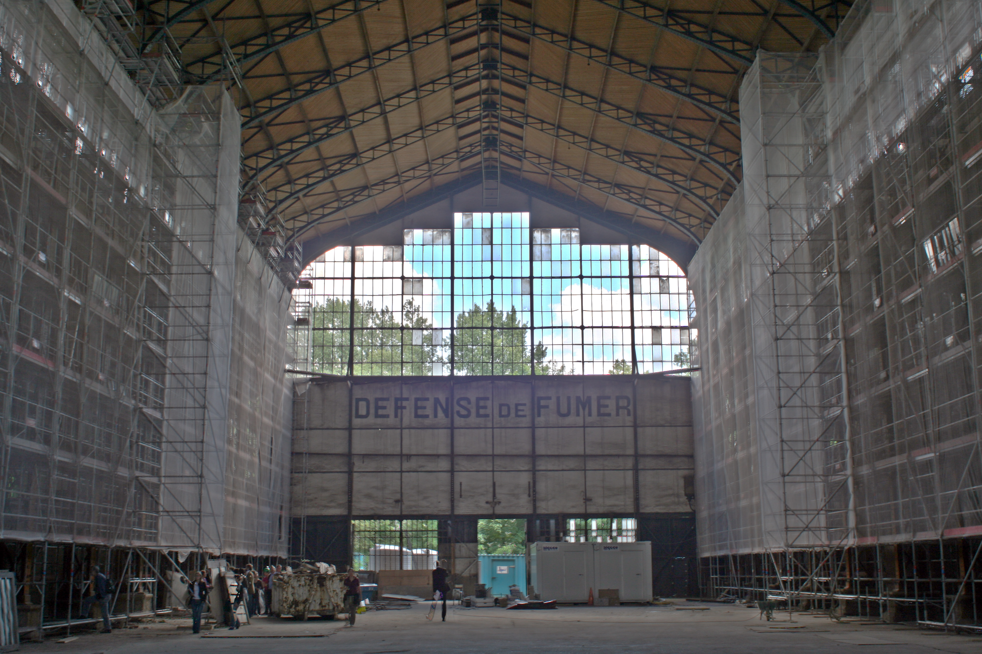 Vue de l'intérieur du hangar Y en cours de restauration. Fusion de 3 photos avec Qtpfsgui.